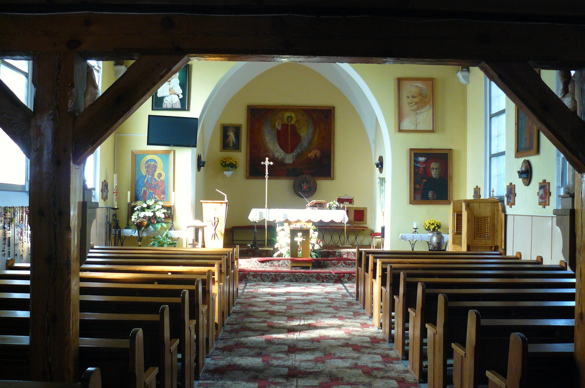 Kościół Chrystusa Króla - Rokietnica.